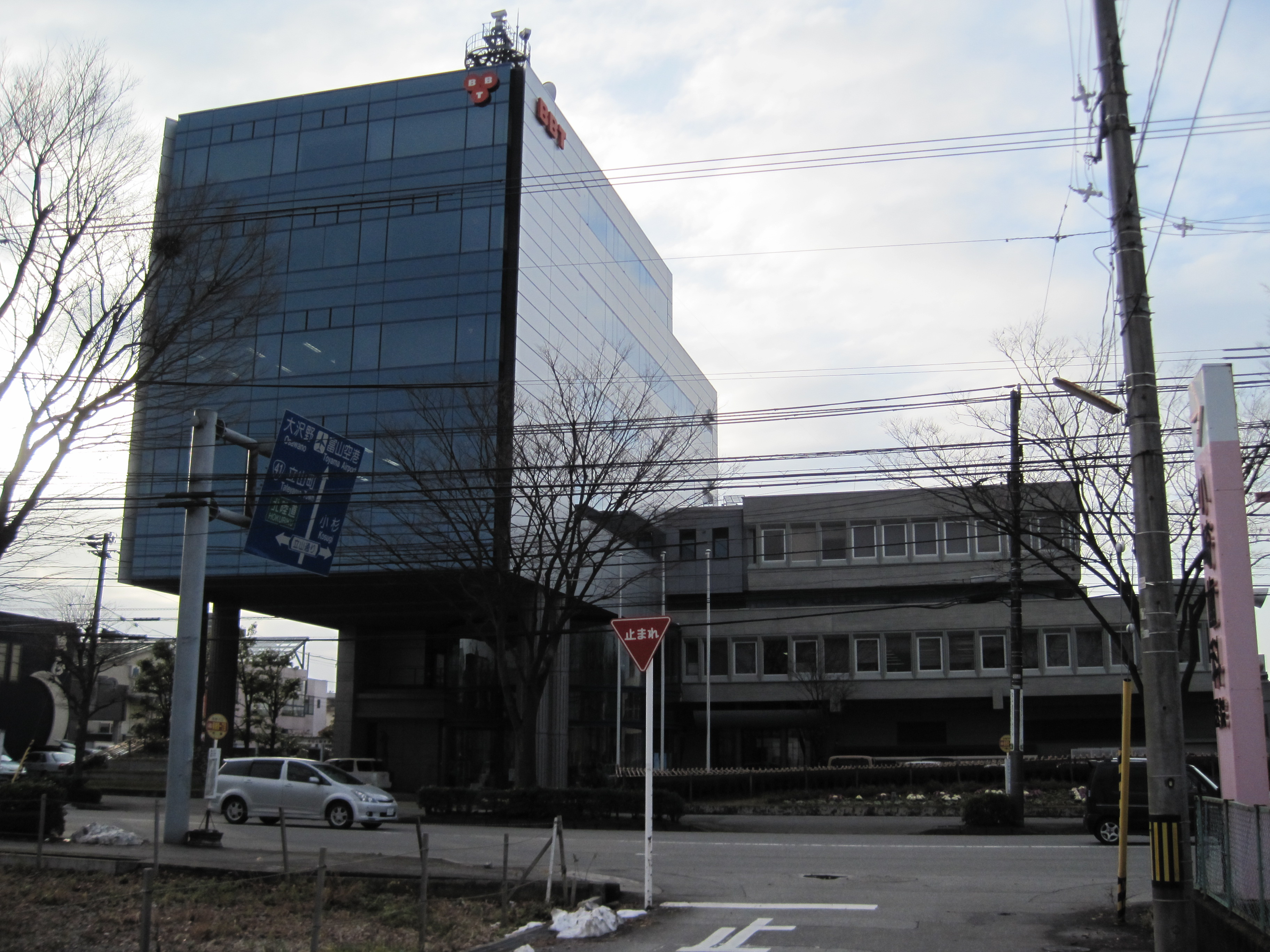 富山テレビ放送（BBT）本社（富山県富山市）